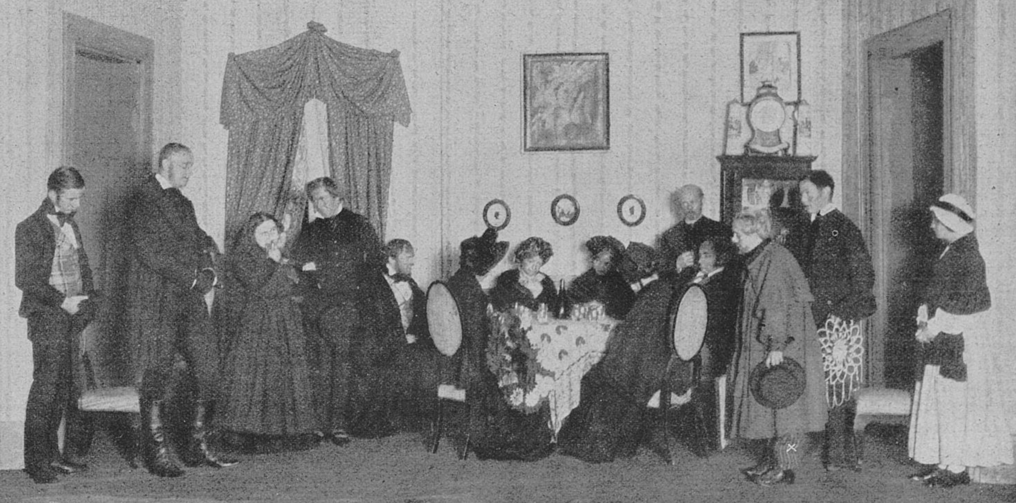 Szene aus dem 4. Akt – Trauergesellschaft in der guten Stube – von Hans Müller-Schlössers lustiger Komödie "Schneider Wibbel". Das Stück fand bei seiner Uraufführung im Düsseldorfer Schauspielhaus großen Beifall. X der Autor in einer kleinen Nebenrolle – als Hausierer Fletsch.